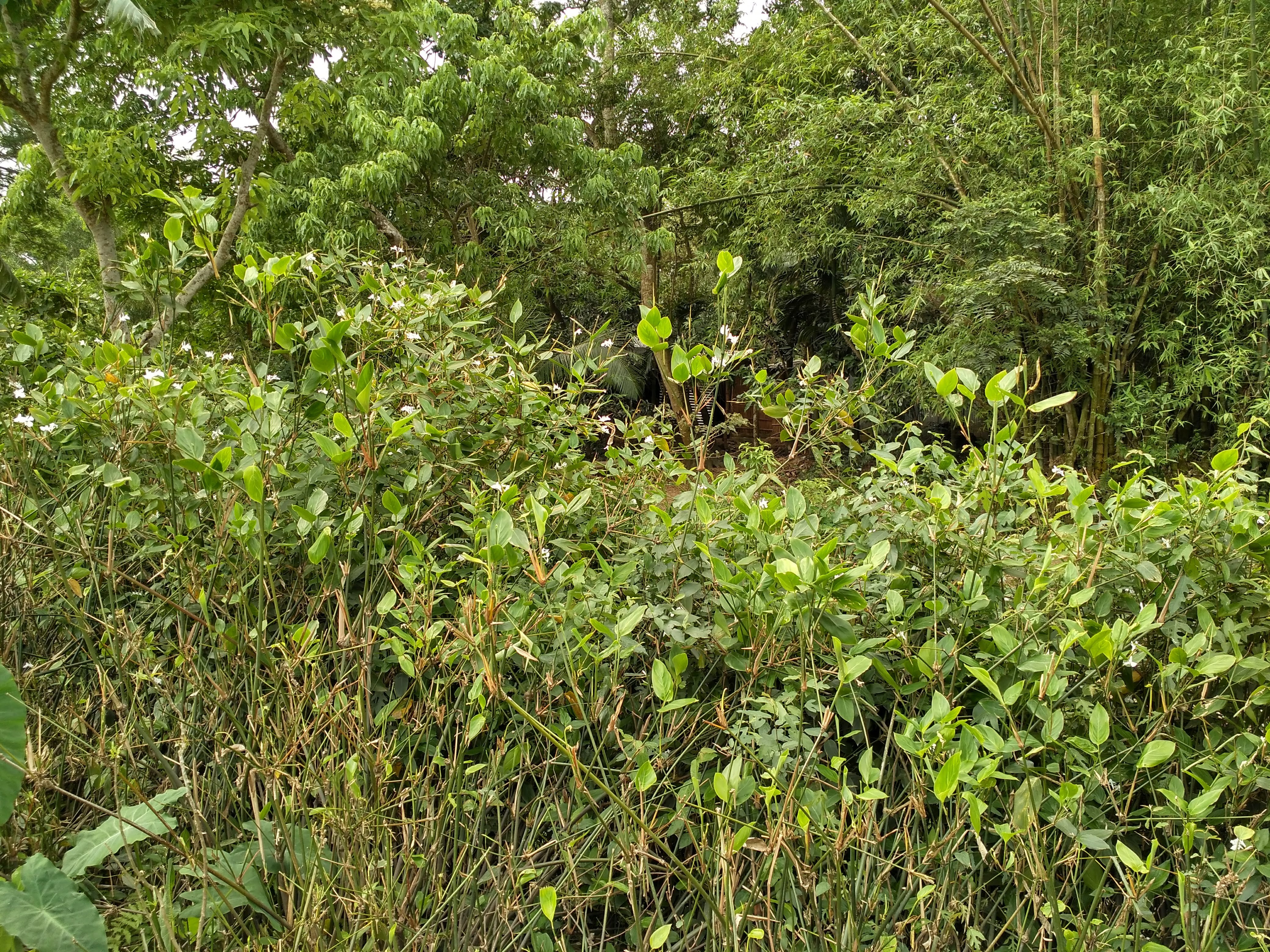 দেওটুকুন, পূর্বধলা, নেত্রকোনায় কংস নদীর তীরে অযত্নে বেড়ে উঠা মুর্তা গাছ ( পাটিবেত)।